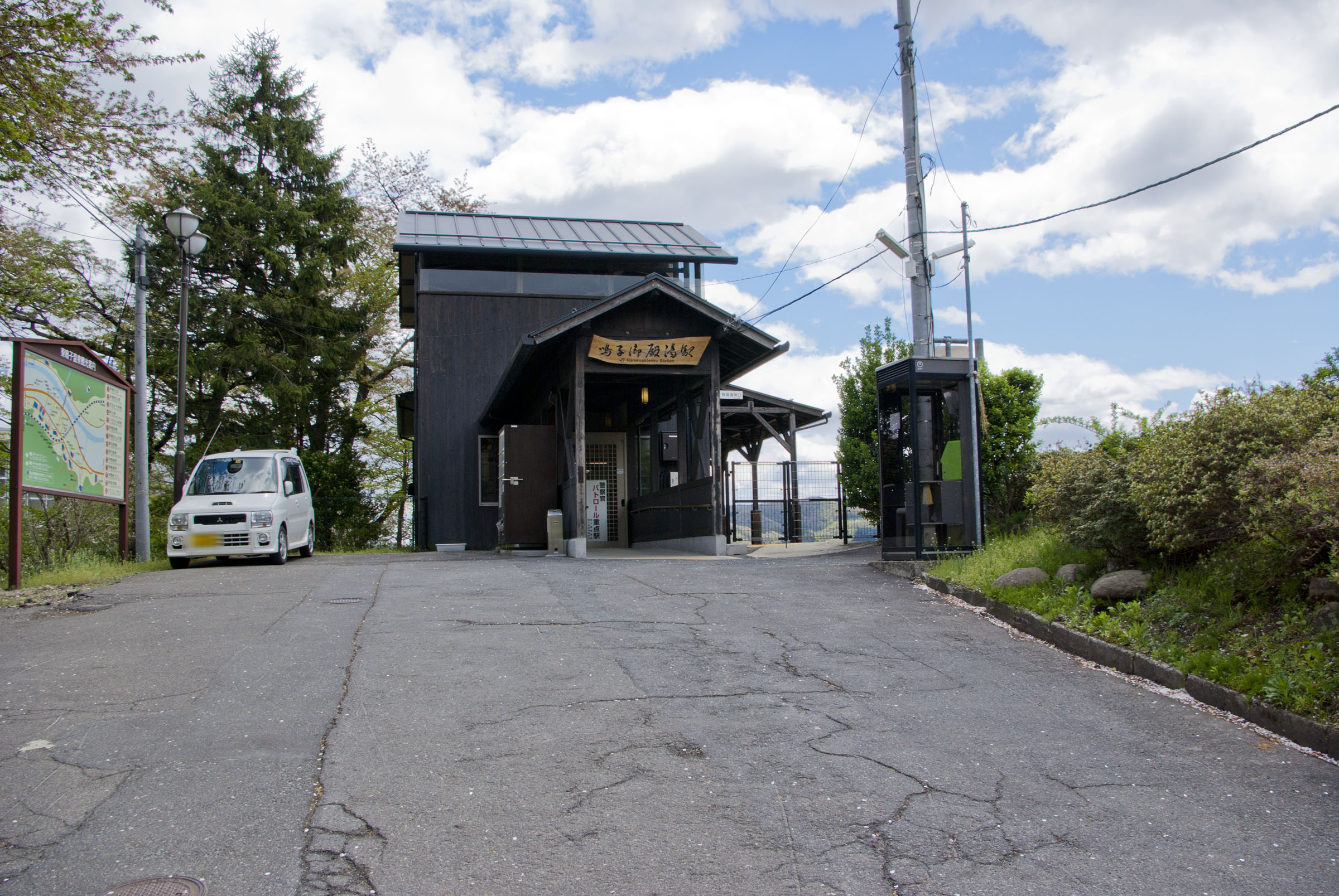 東日本旅客鉄道陸羽東線鳴子御殿湯駅